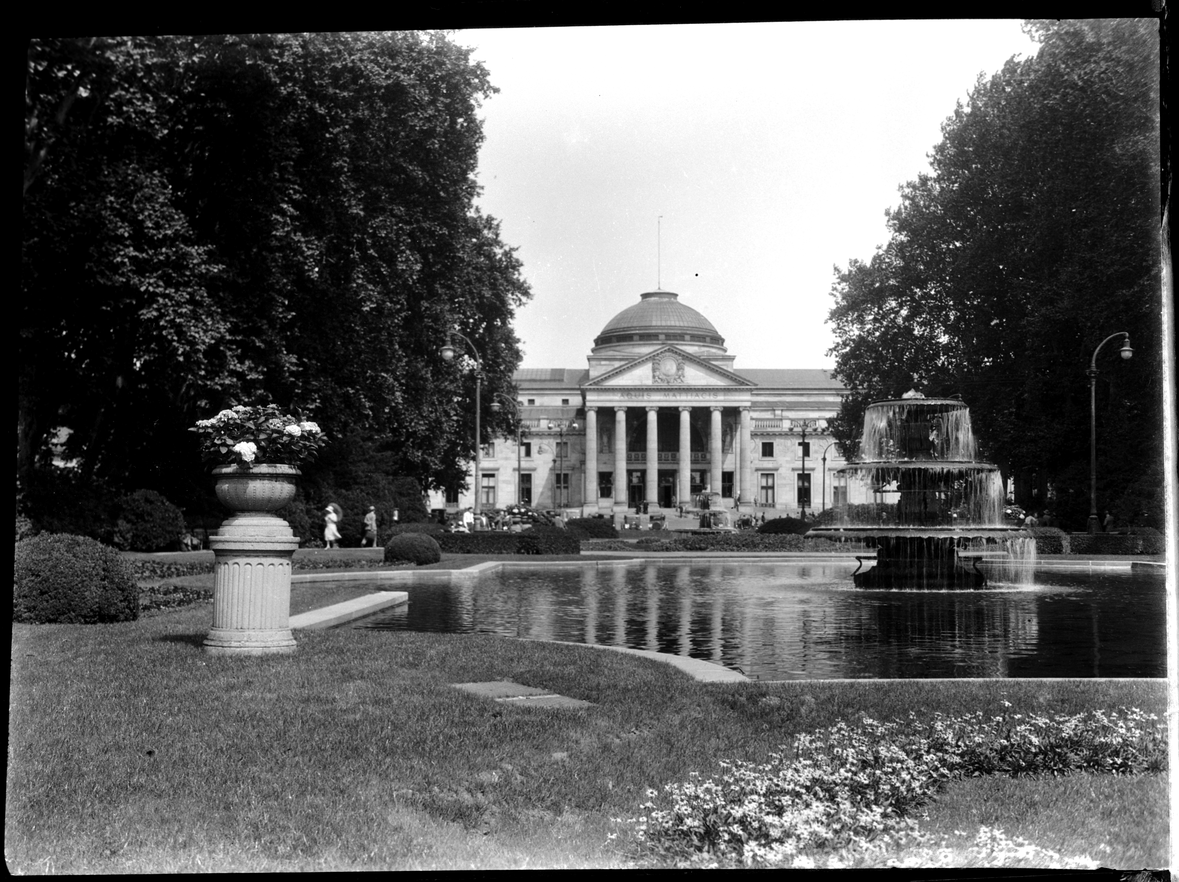 Das Kurhaus in Wiesbaden. Es handelt sich um einen Scan von einem Glasnegativ von ungefähr Anfang der 1930er Jahre, wahrscheinlich fotografiert von meinem verstorbenen Urgroßvater Wilhelm Ihrig - ihm gehörte die Kamera und das Foto.